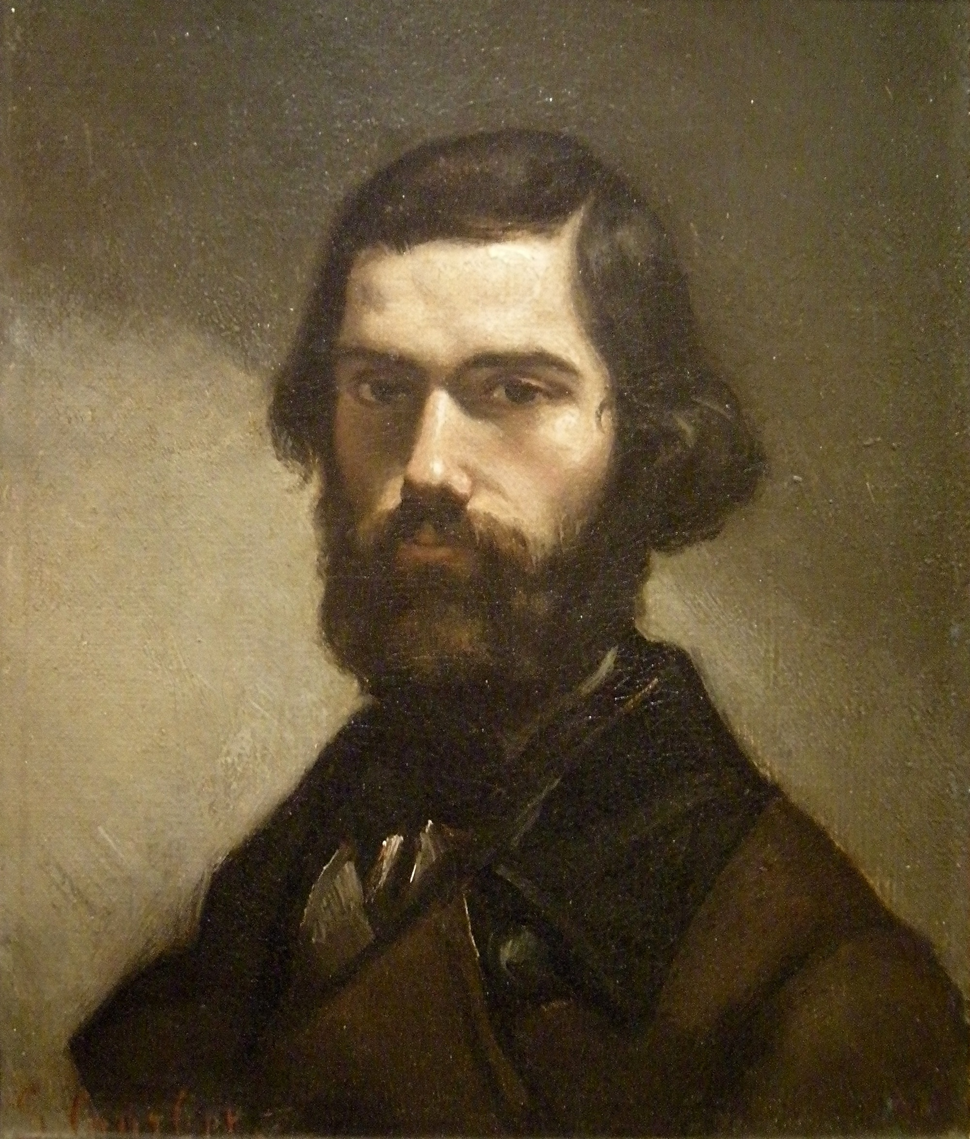 Portrait of Jules Vallès (1832-1885)